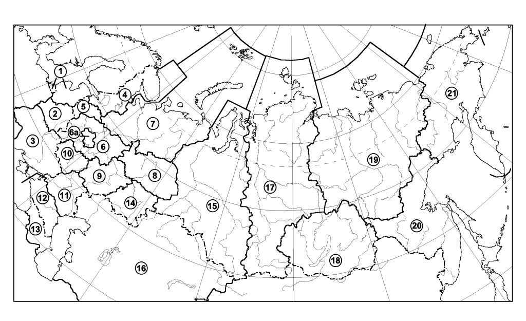 Гербарий Московского университета, районирование отдела мхов